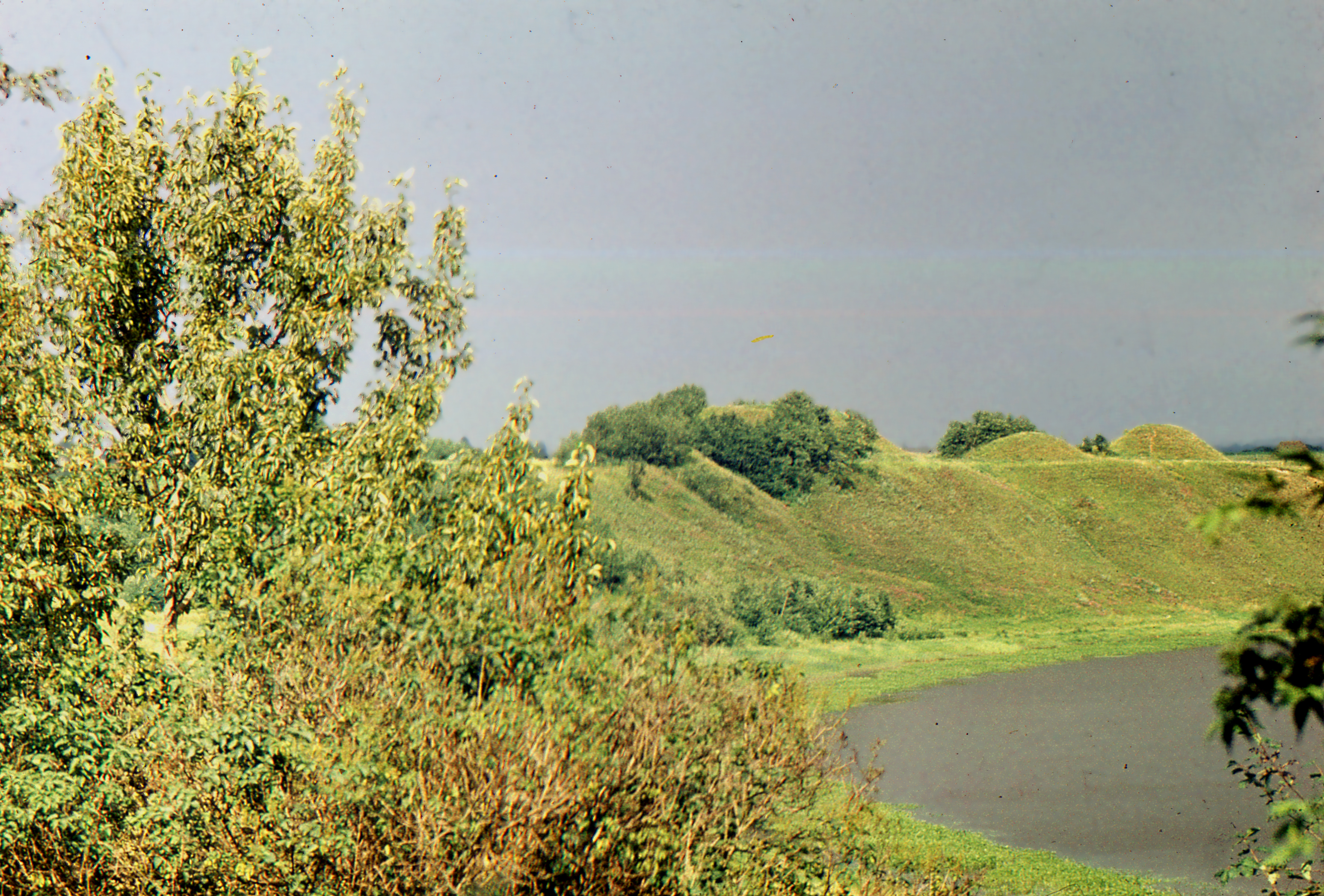 Река Волхов.Курганы ниже Старой Ладоги